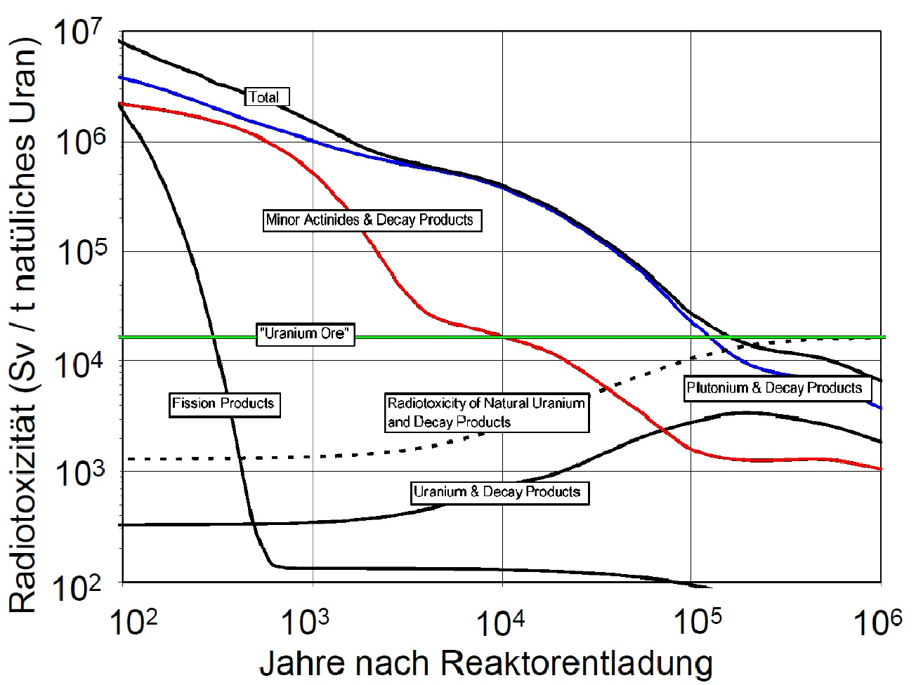 Radiotoxizität abgebrannten Kernbrennstoffs, in Sievert pro Tonne Natururan. Aus einer Präsentation des Forschungszentrums Dresden-Rossendorf